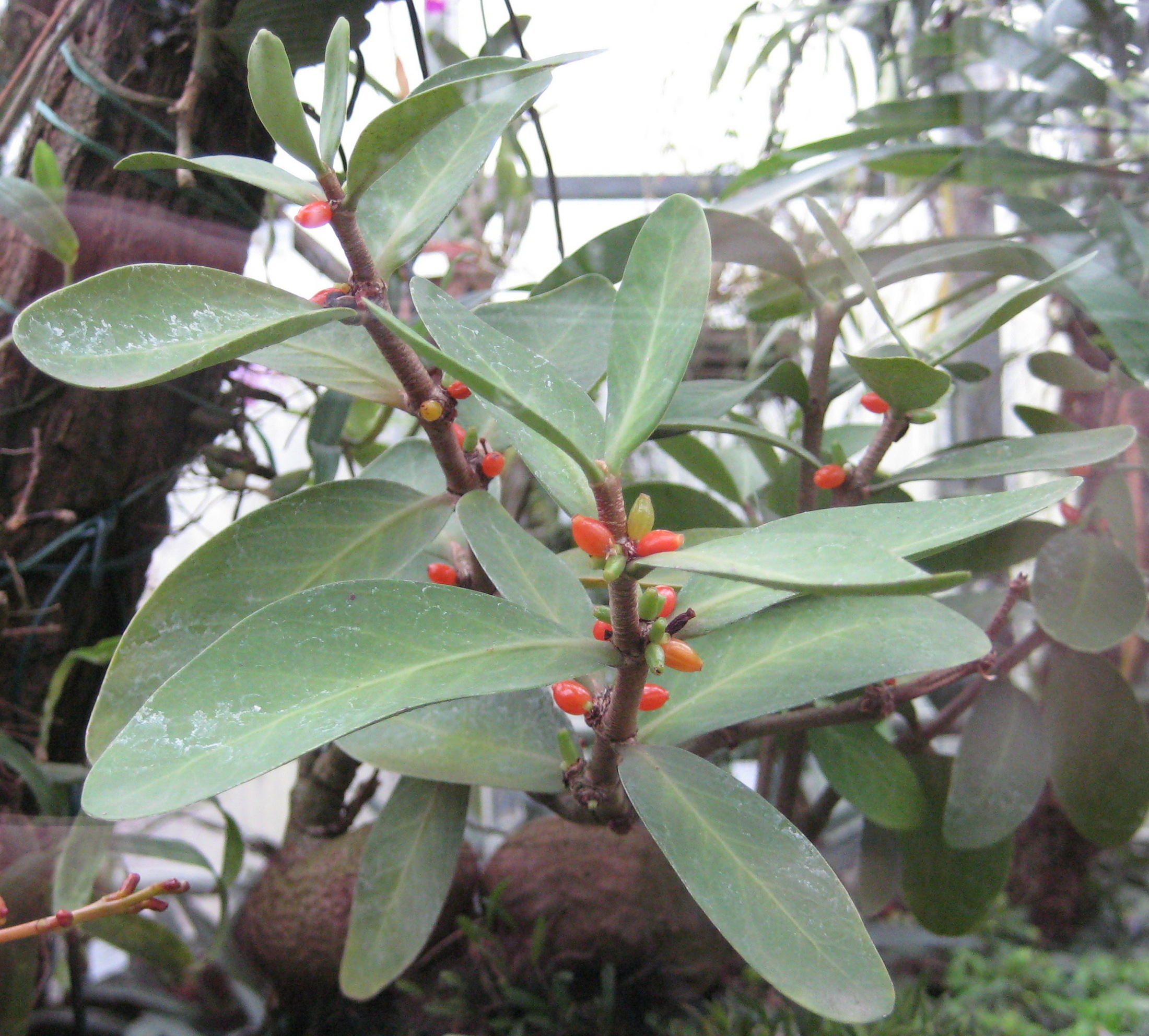 Hydnophytum formicarum im Botanischen Garten Dresden